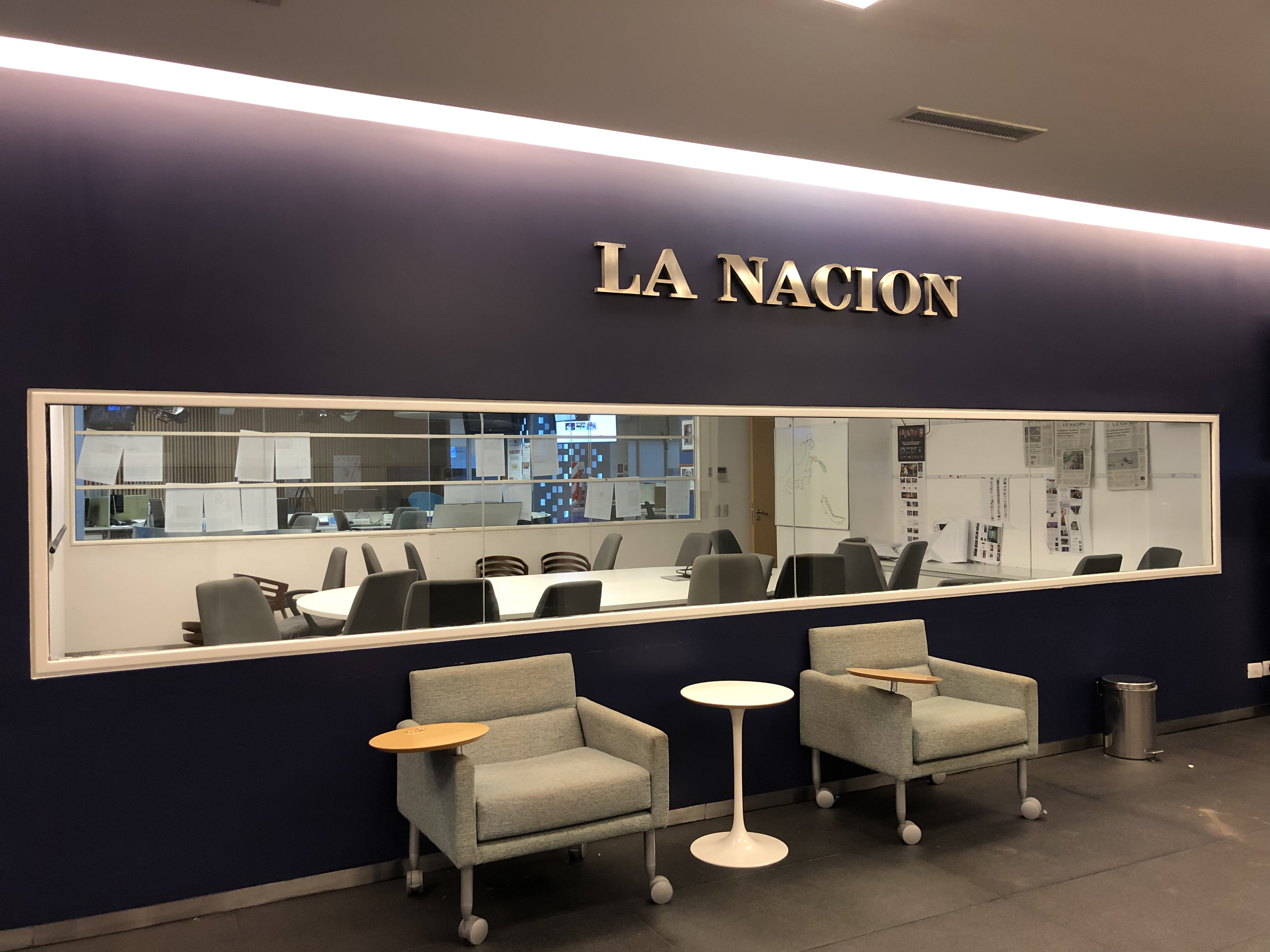 Área de Redacción de La Nación